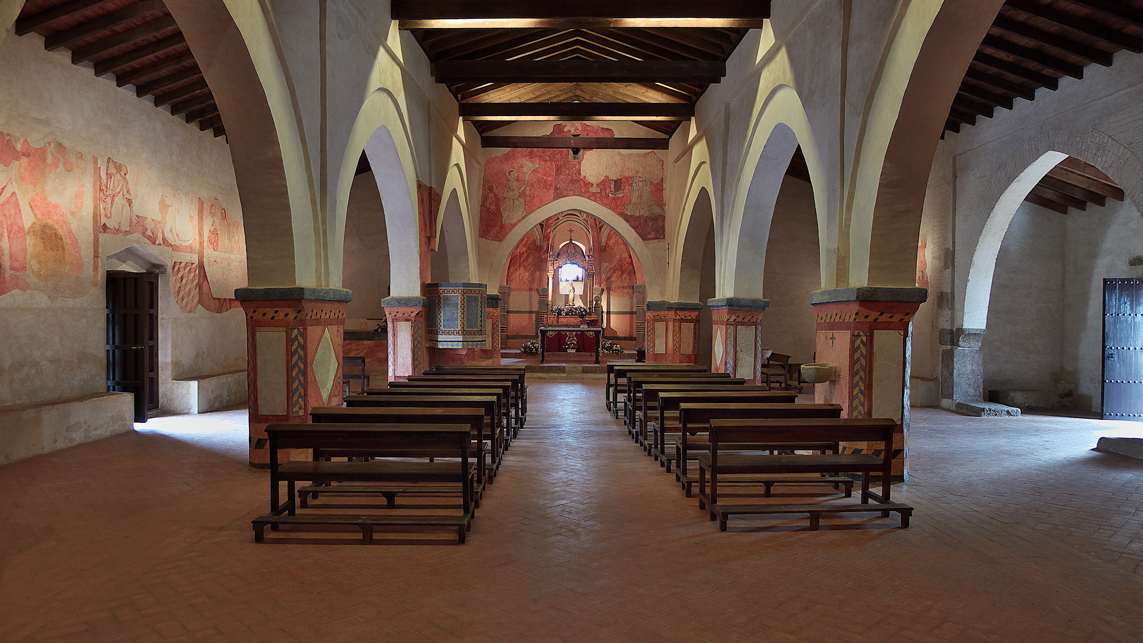 También conocida como Ermita de San Mamés. Arquitectura gótico-mudéjar (ss. XIII-XIV) en la sierra de los Picos de Aroche.